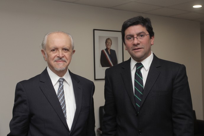 Pablo Badenier reunido con Mario Molina, para conversar sobre una serie de medidas propuestas para la descontaminación de la Región Metropolitana de Santiago.